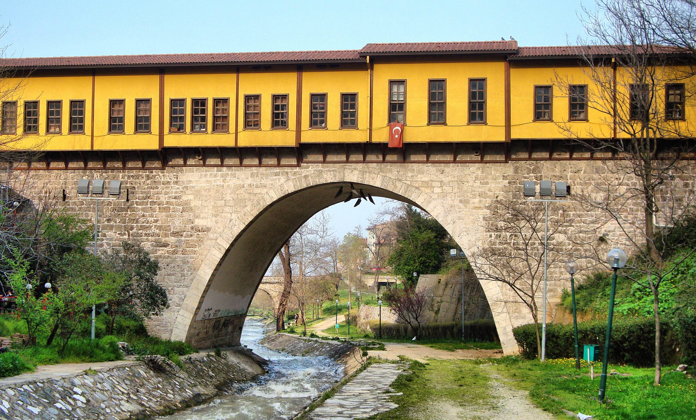 Irgandı köprüsü-Köprülü çarşı veya çarşılı köprü.-Bursa.